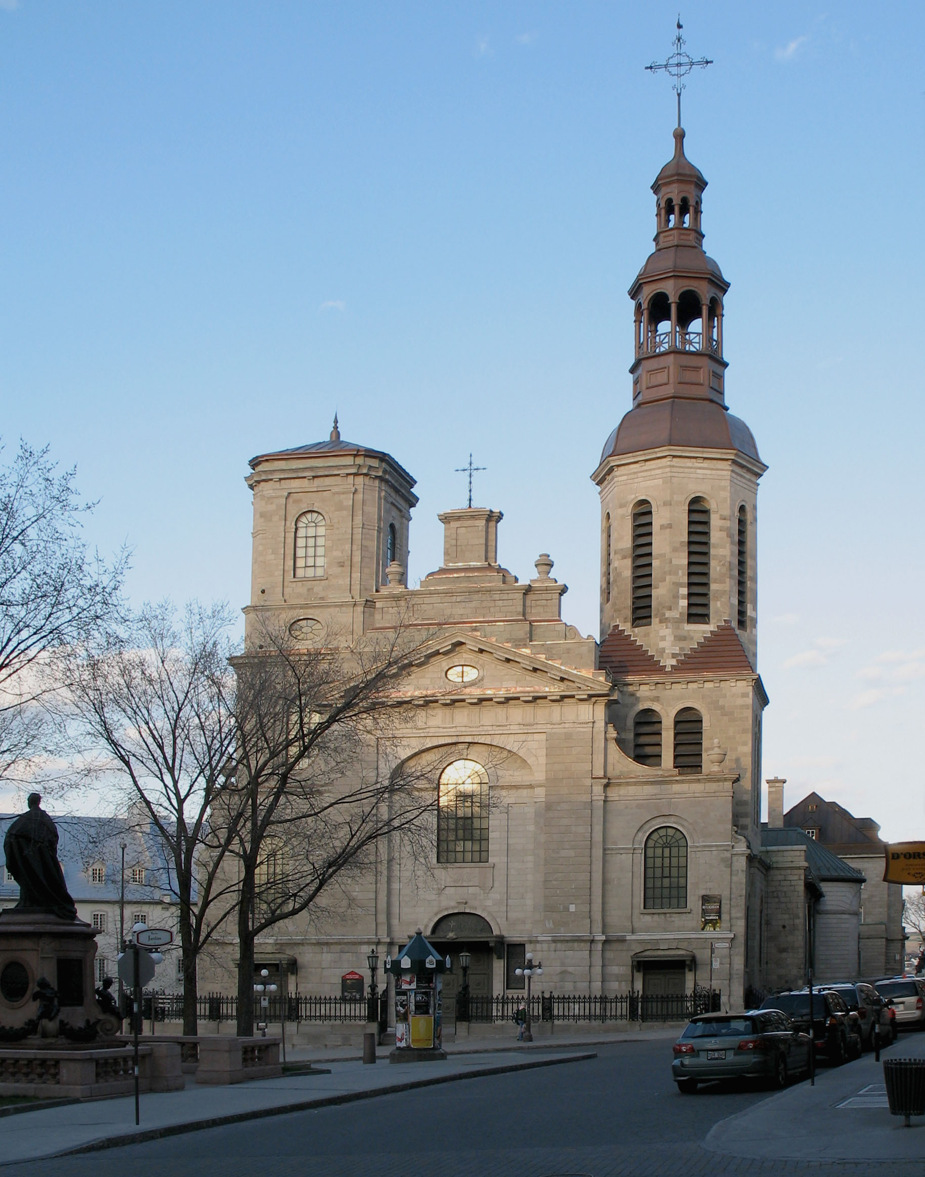 Basilique-cathédrale Notre-Dame de Québec, classée monument historique dans l'arrondissement historique du Vieux-Québec, Québec, Canada. L'arrondissement figure depuis 1985 sur la liste du patrimoine mondial établie par l’UNESCO.